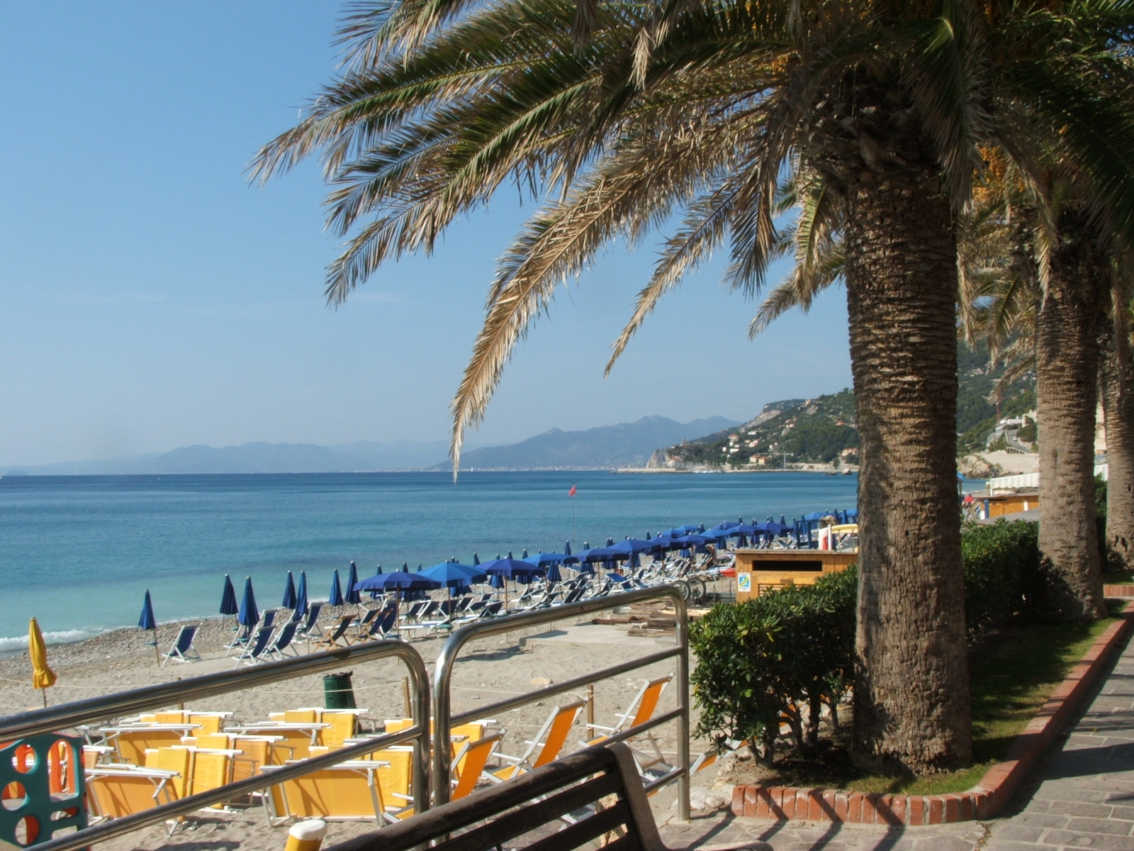 Immagine da Varigotti, frazione di Finale Ligure, riviera ligure di ponente, Liguria, Italia